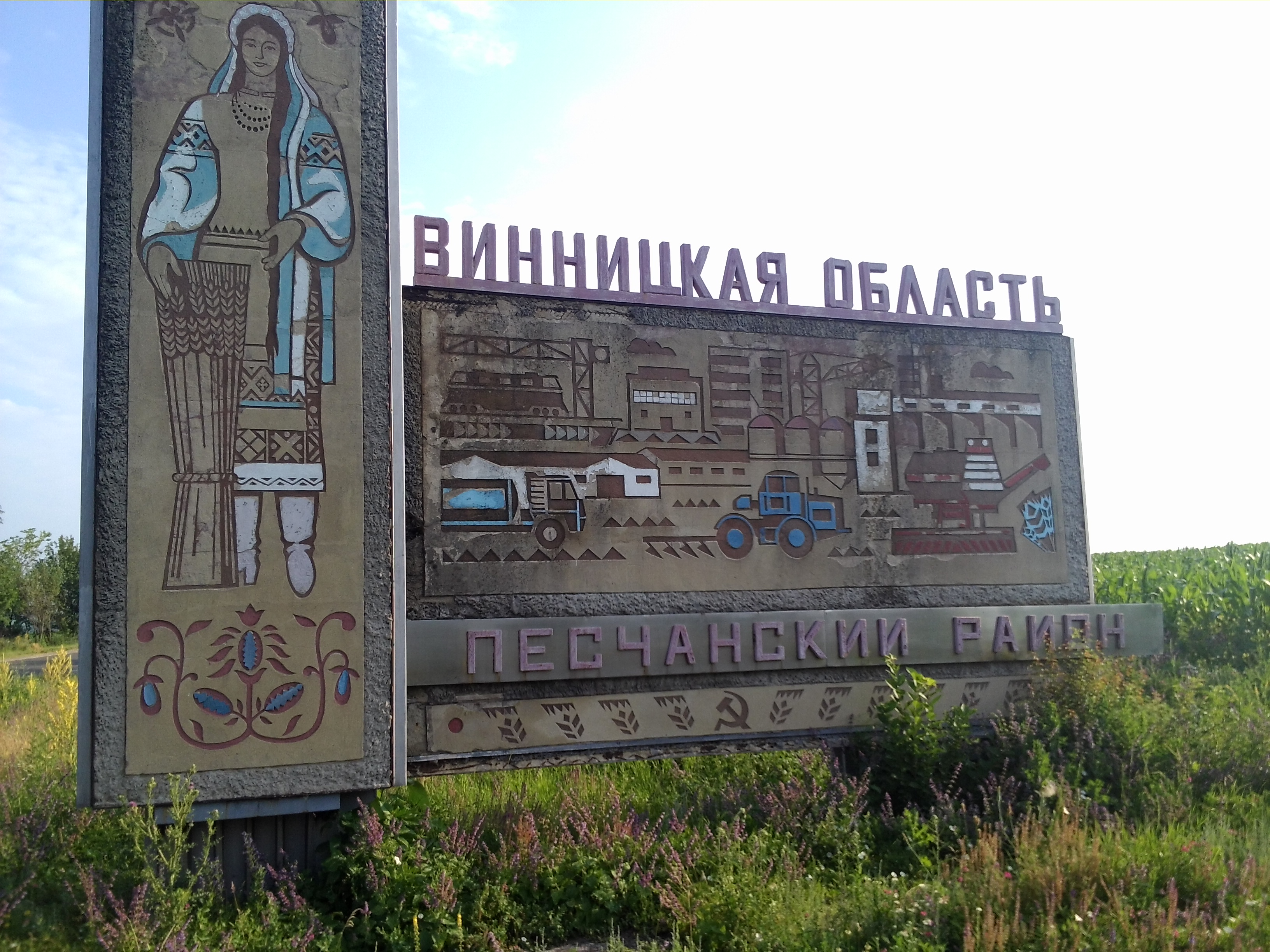 В'їзд до України через пункт пропуску Болган (Піщанський район, Вінницька область)